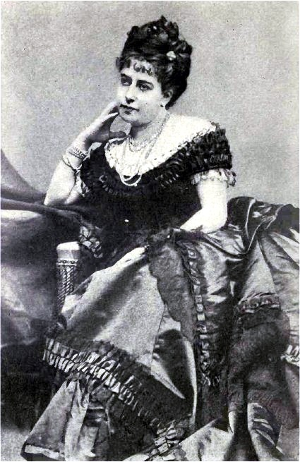 Lillie de Hegermann-Lindencrone (1844-1928) - Mrs. Charles Moulton